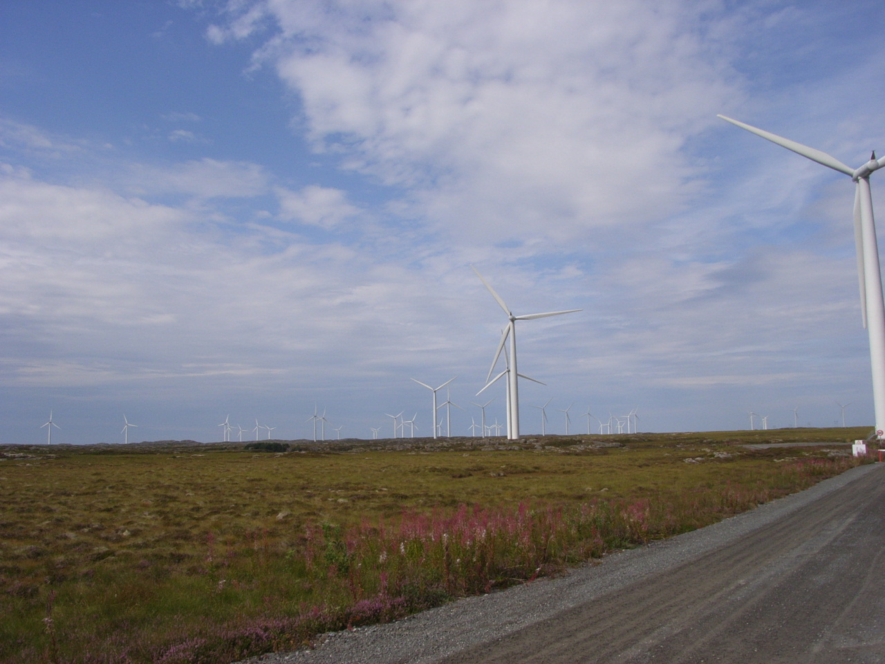 Smøla vindpark